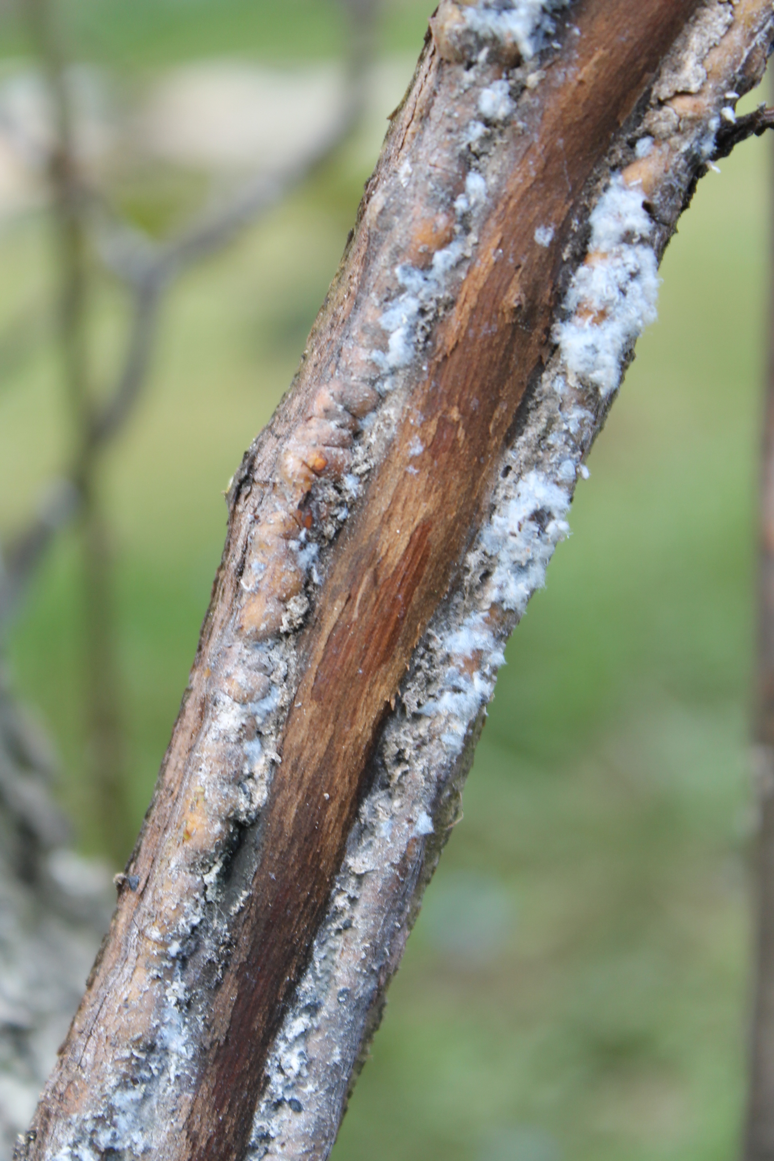 poškozený letorost, zával v místě sání mšice krvavé, kalus, jabloň